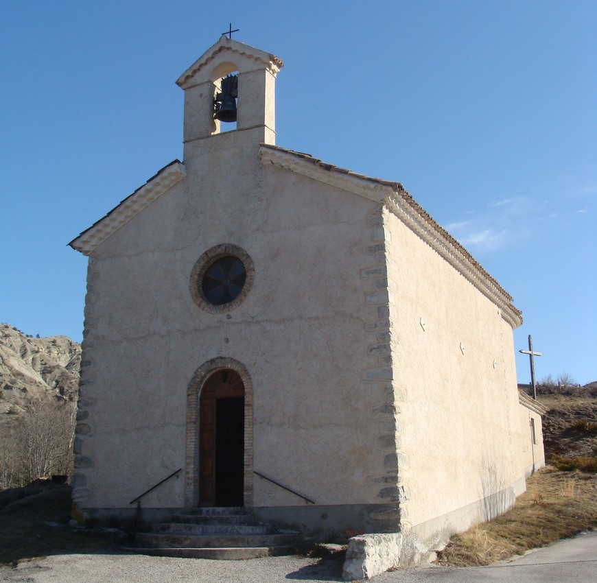 L'église d'Oze (Hautes-Alpes). Style commun des chapelles haut-alpines : porte en façade, oeil-de-boeuf, clocheton, toit en tuiles avec génoise. Pierres d'angles, parements des ouvertures en briques (plus rare localement).